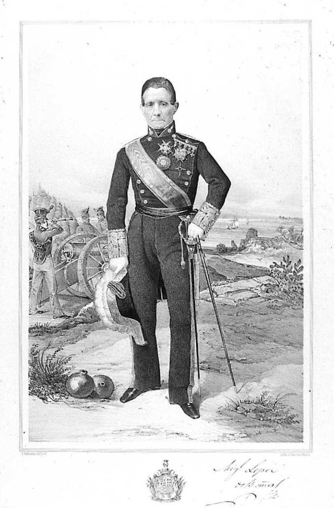 Miguel López de Baños, litografía de Domingo Valdivieso y Henarejos para Estado Mayor General del Ejército Español de Pedro Chamorro, 1852 y facsímil del autógrafo.